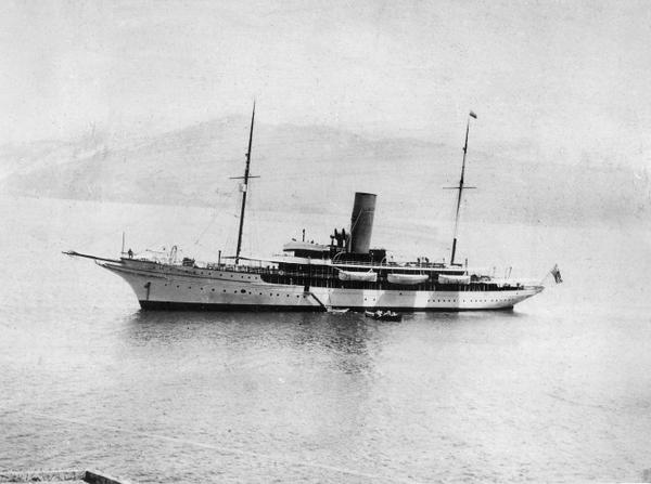 Іоланда сімї Терещенків: Іоланда сімї Терещенків